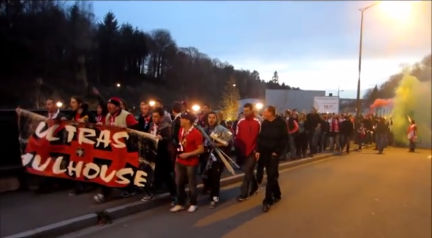 Arrivée des supporters mulhousiens à la patinoire d'Epinal